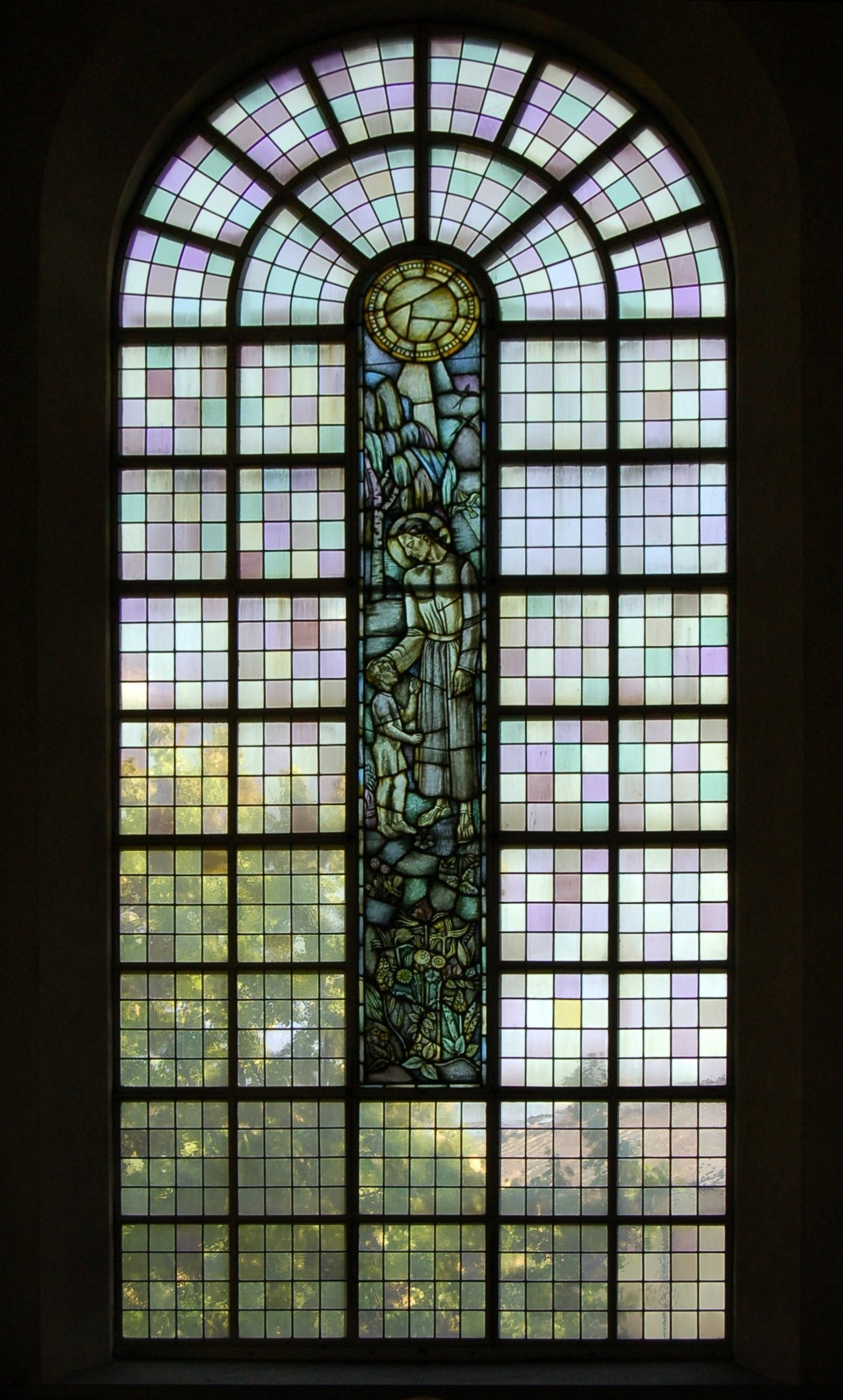 Glasmålning av Gunnar Torhamn i Hedvig Eleonora kyrka i Stockholm